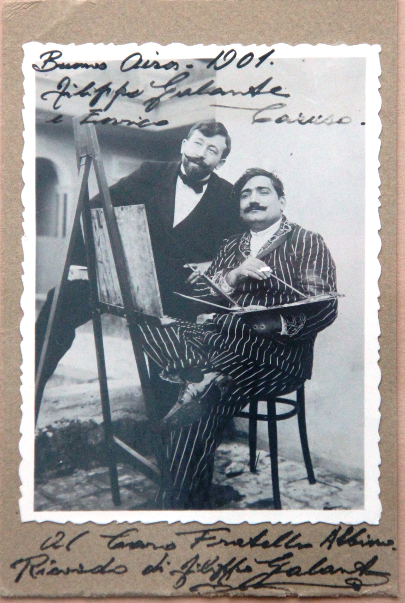 Filippo (Felipe) Galante ed Enrico Caruso a Buenos Aires nel 1901. Cartolina inviata dal pittore e medaglista Filippo Galante (1872-1953), nato a Sora, Italia, emigrato in Argentina, naturalizzato argentino nel 1916, al fratello Giuseppe Albino Galante (1887-1967) a Tivoli, Italia. La cartolina fa parte della collezione di Angelo Trusiani, a Roma (2014).